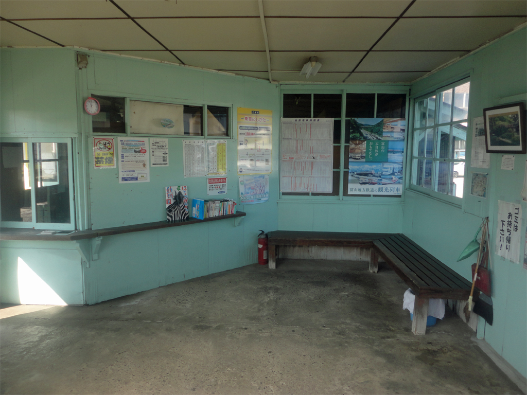 富山地方鉄道本線 舌山駅 駅舎内